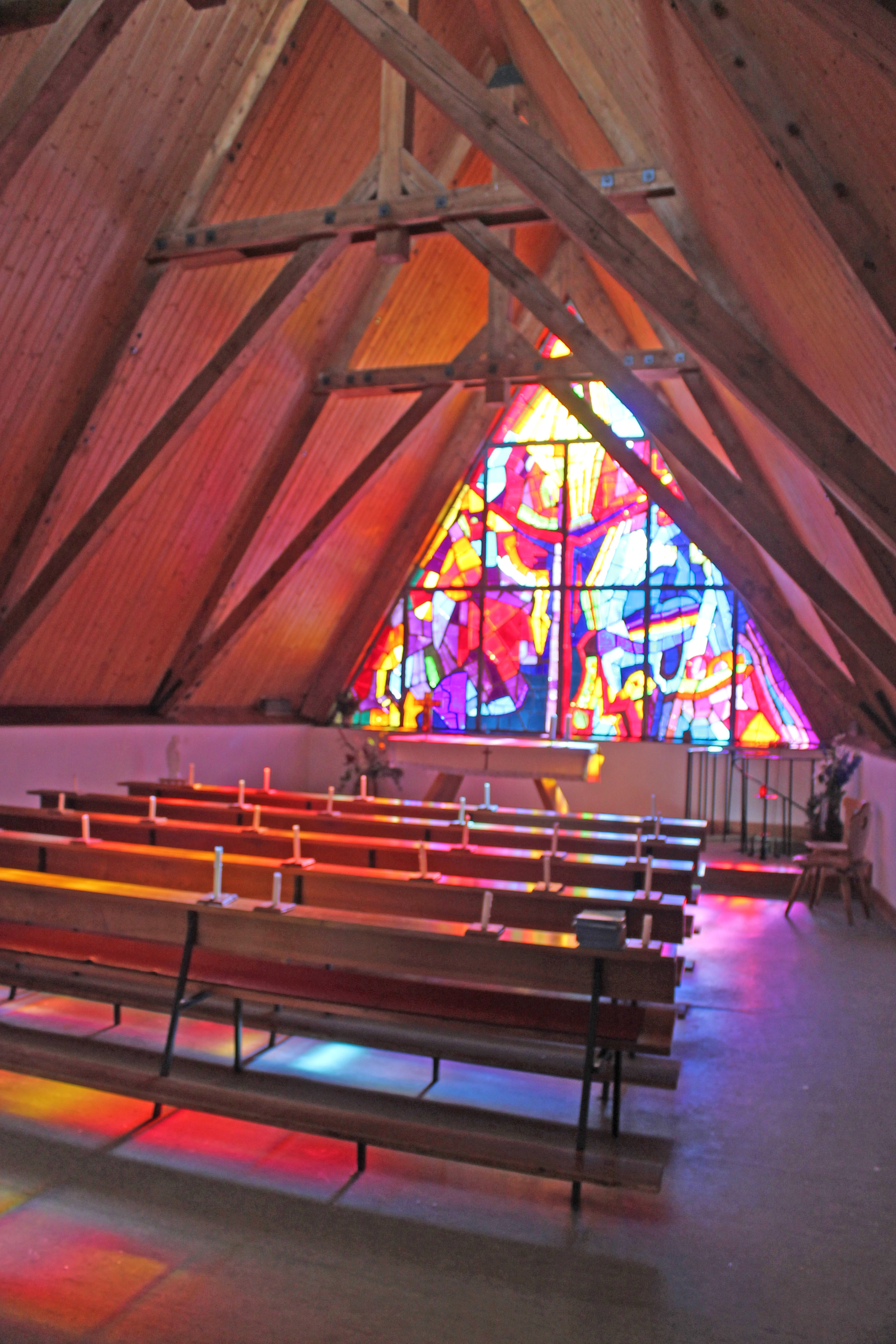 Object location47° 35′ 44.97″ N, 14° 00′ 00.6″ E